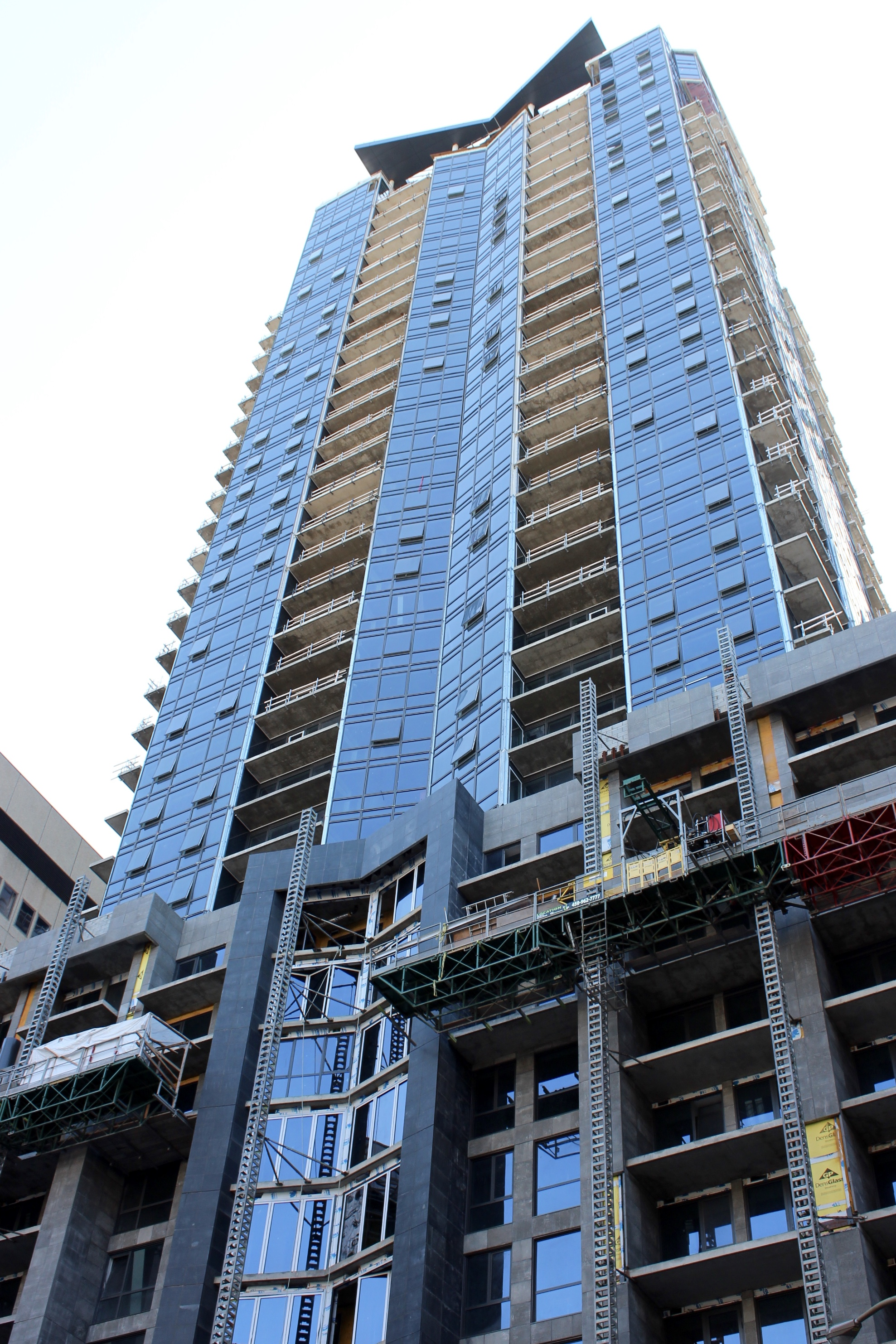 Condos TOM en construction.